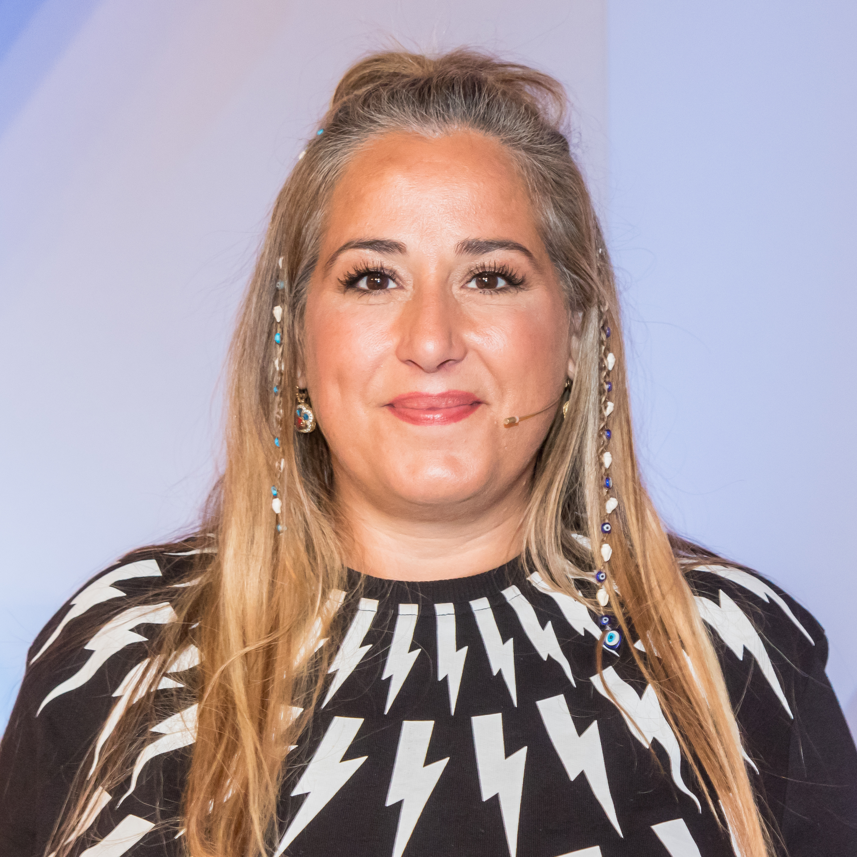 MAISCHBERGER am 14. August 2019 in Köln. Produziert vom WDR. Sommerstaffel „maischberger. die woche“ Foto: İdil Baydar, Kabarettistin